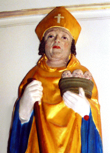 Fotografie einer Statue des heiligen Siegfried